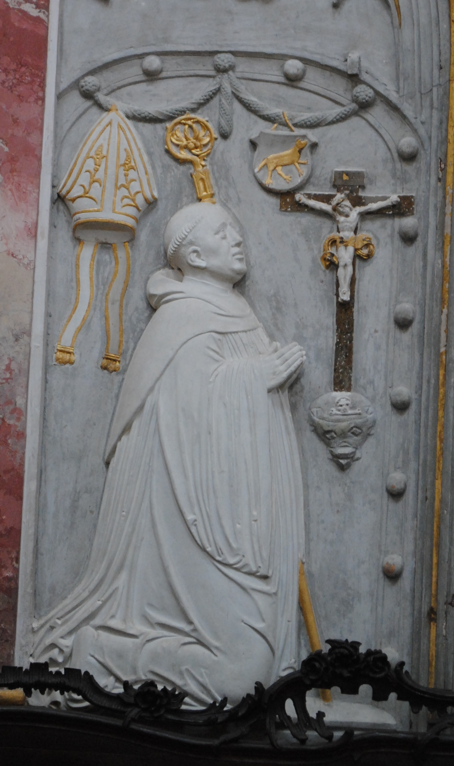 Epitaph des Ebracher Abtes Johannes III. Wolf, genannt Lupi